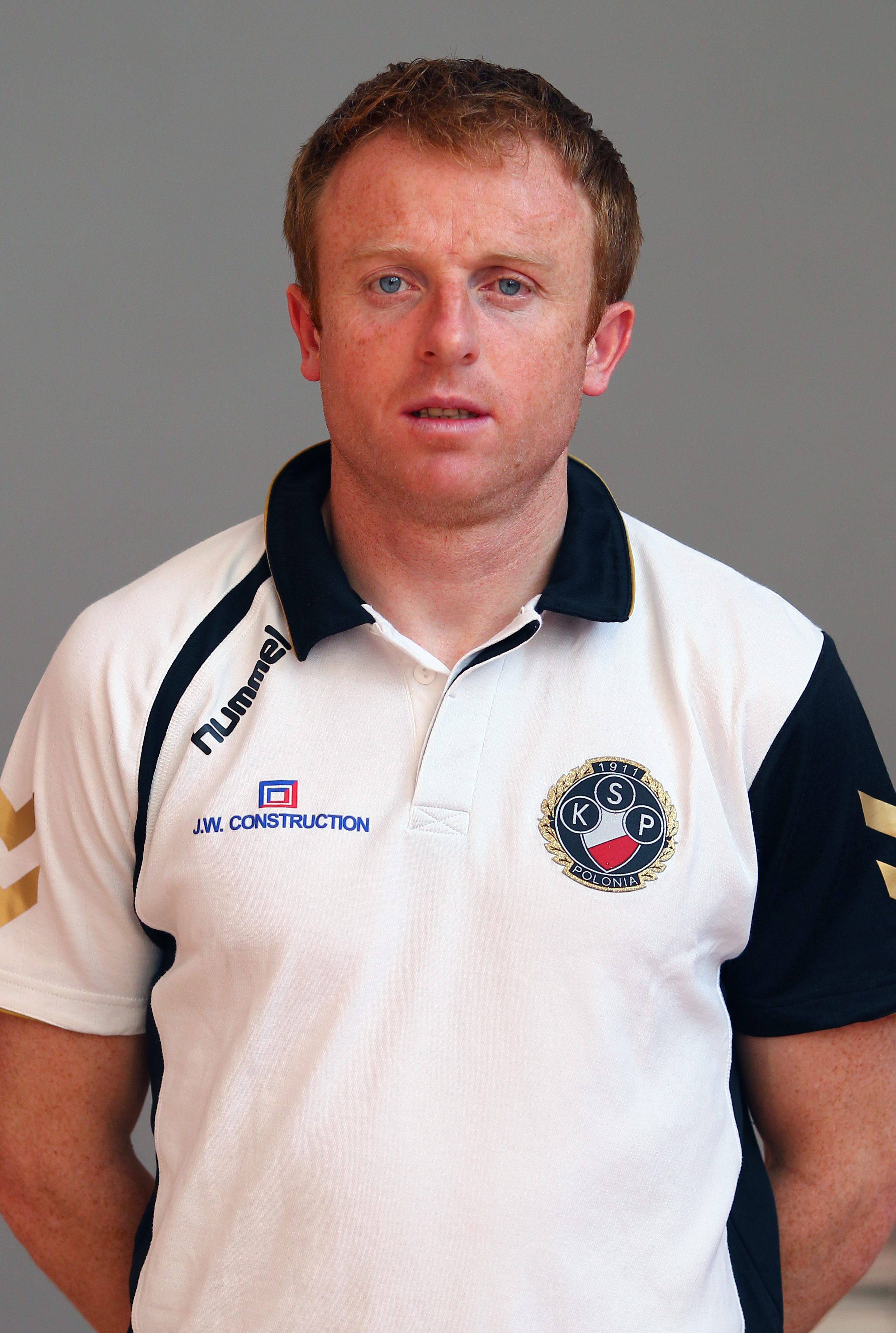 assistant coach Piotr Stokowiec (2011)